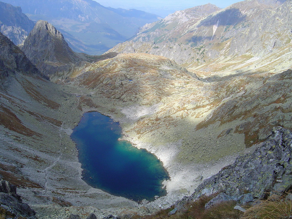 Hruba veza and Zamrznute pleso